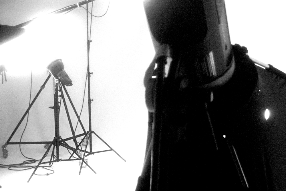 White Cube Artistic Research/White Cube Künstlerische Forschung, installation view/Installationsansicht, 1994, Ruediger John